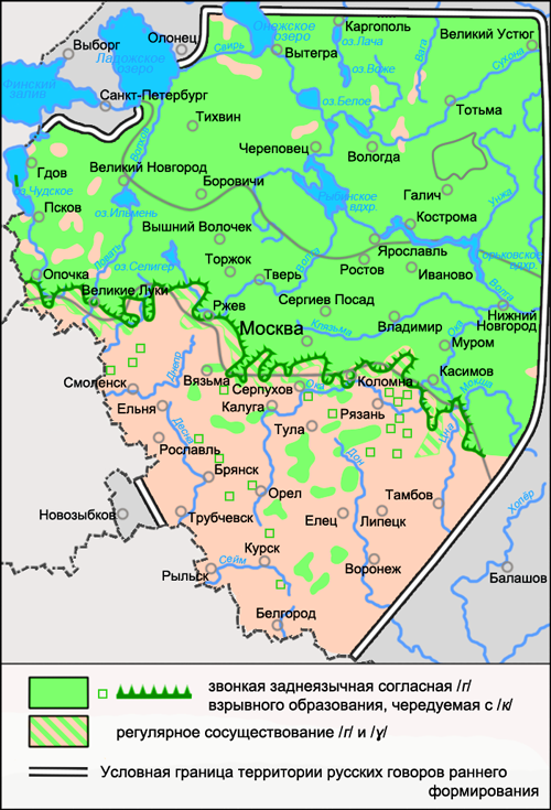 Карта распространения заднеязычной согласной г в русских говорах. Источники: Захарова К. Ф., Орлова В. Г., Сологуб А. И., Строганова Т. Ю. Образование севернорусского наречия и среднерусских говоров / Ответственный редактор В. Г. Орлова. — М.: «Наука», 1970. — С. 163 (Карта 49. Звонкие твёрдые задненёбные согласные и их оглушение). Букринская И. А., Кармакова О. Е. и др. Карта 14. Звуки на месте буквы г. Язык русской деревни. Диалектологический атлас. Справочно-информационный портал Грамота.ру